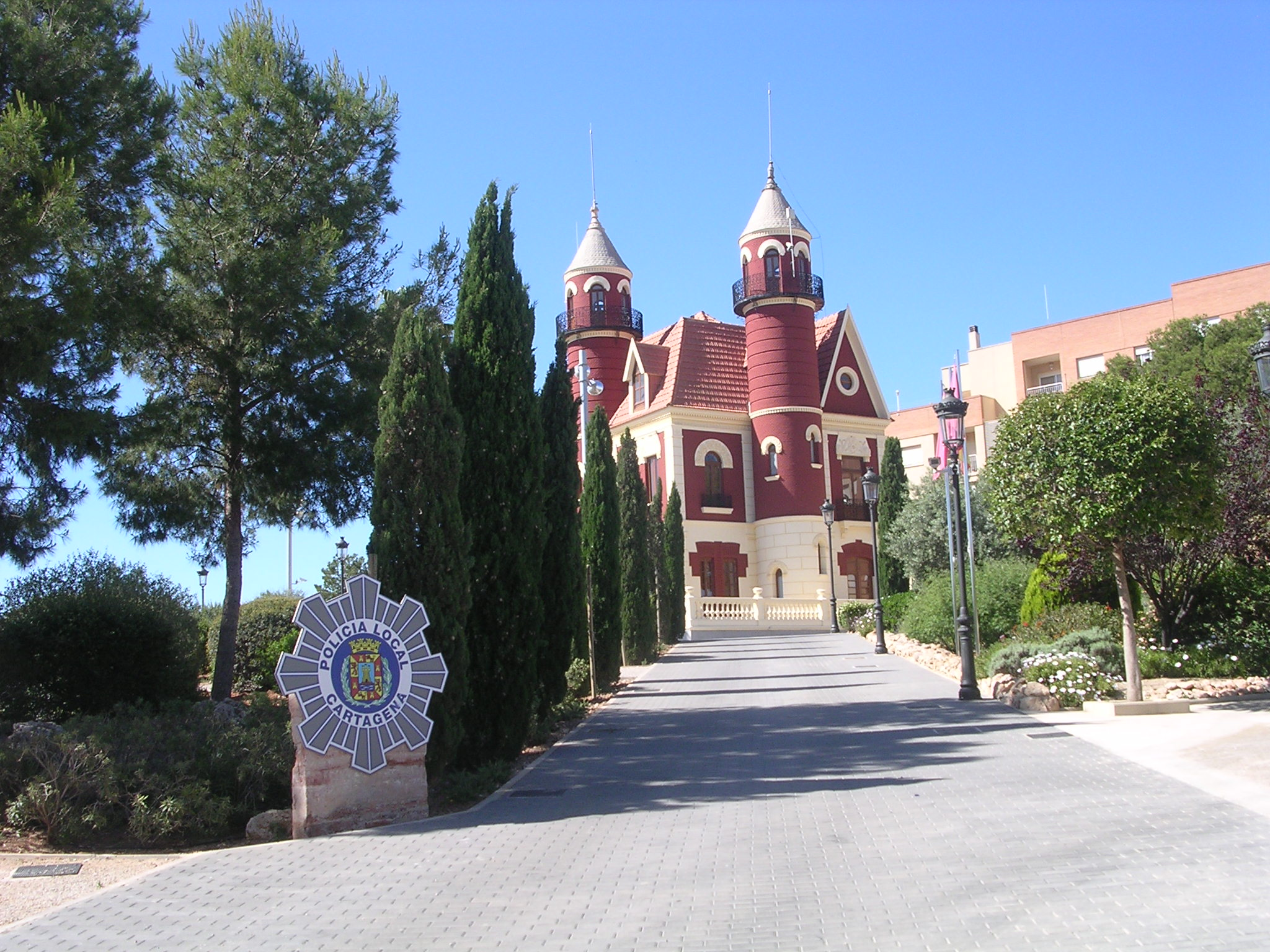 Mansion Situada en Cartagena